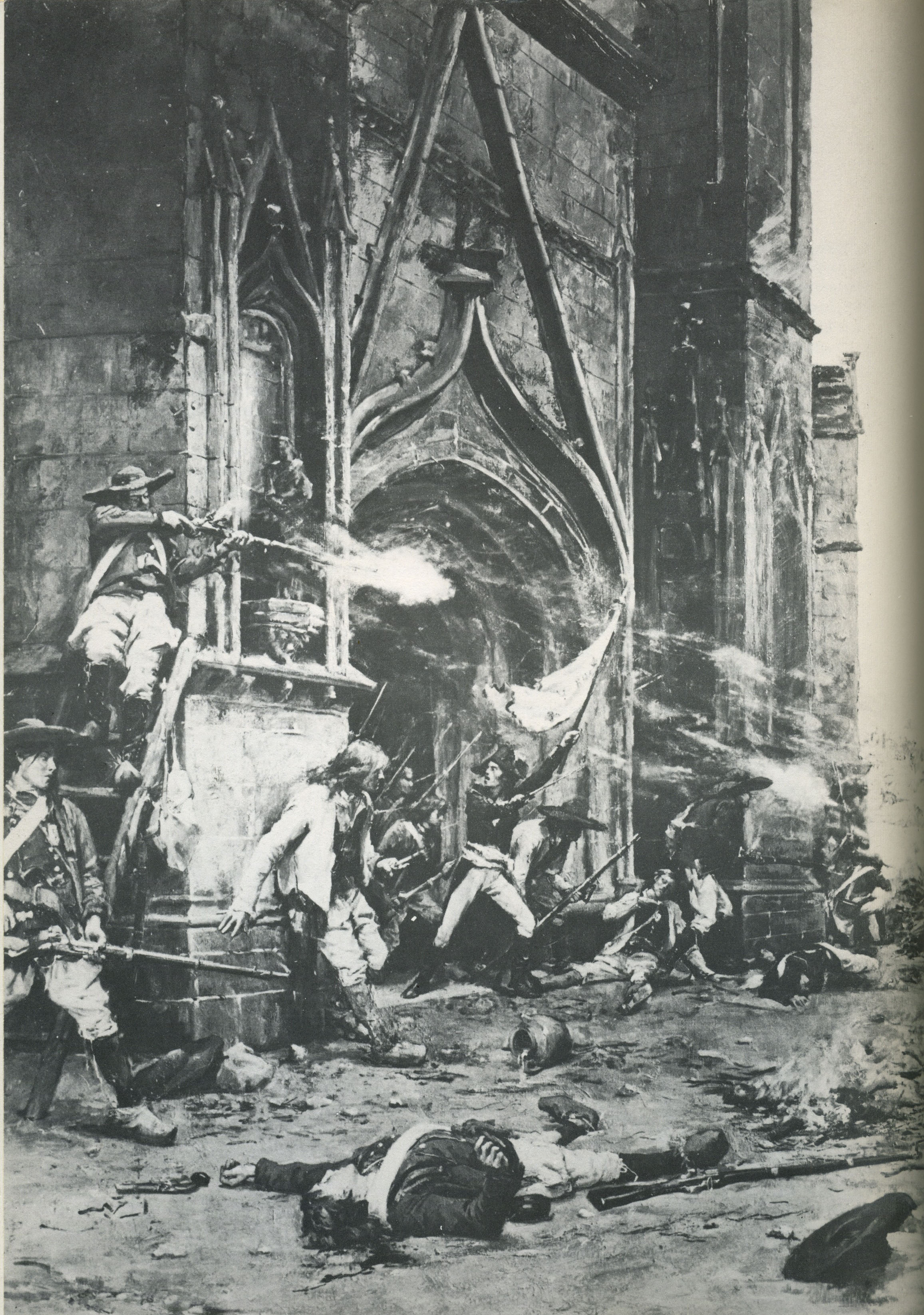 La défense de l'Église